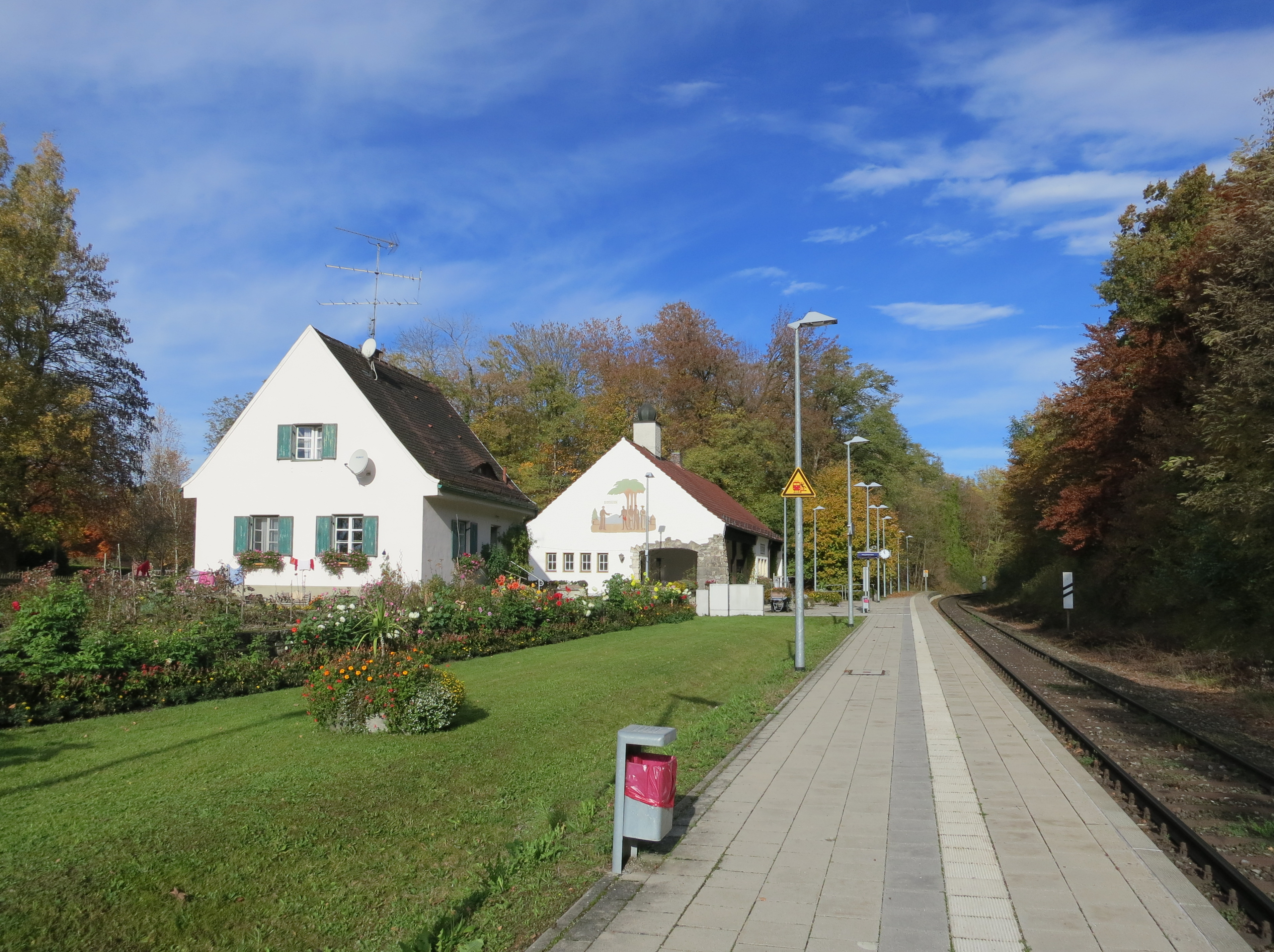 Hausbahnsteig des Bahnhofs St. Ottilien, links das Bahnwohnhaus und das Empfangsgebäude